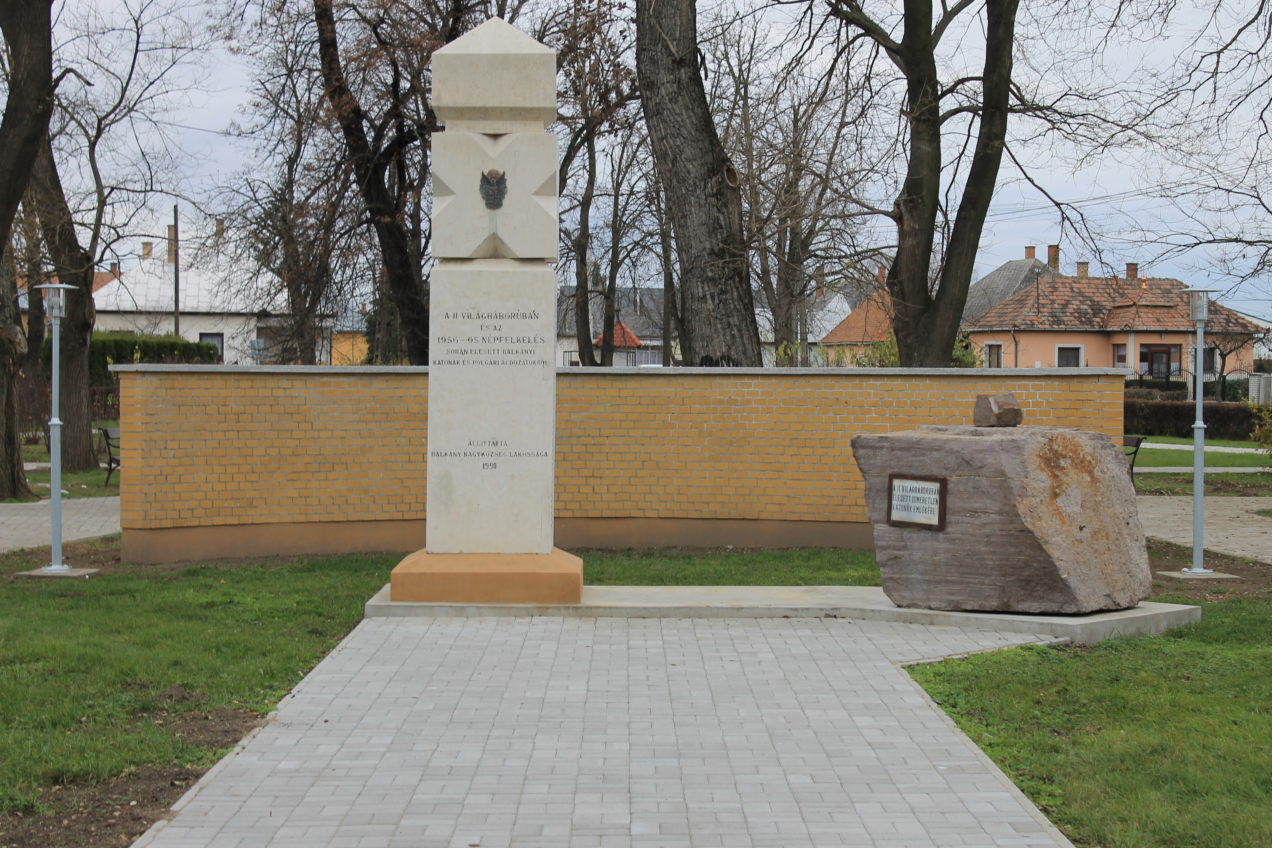 A Hősök szobra